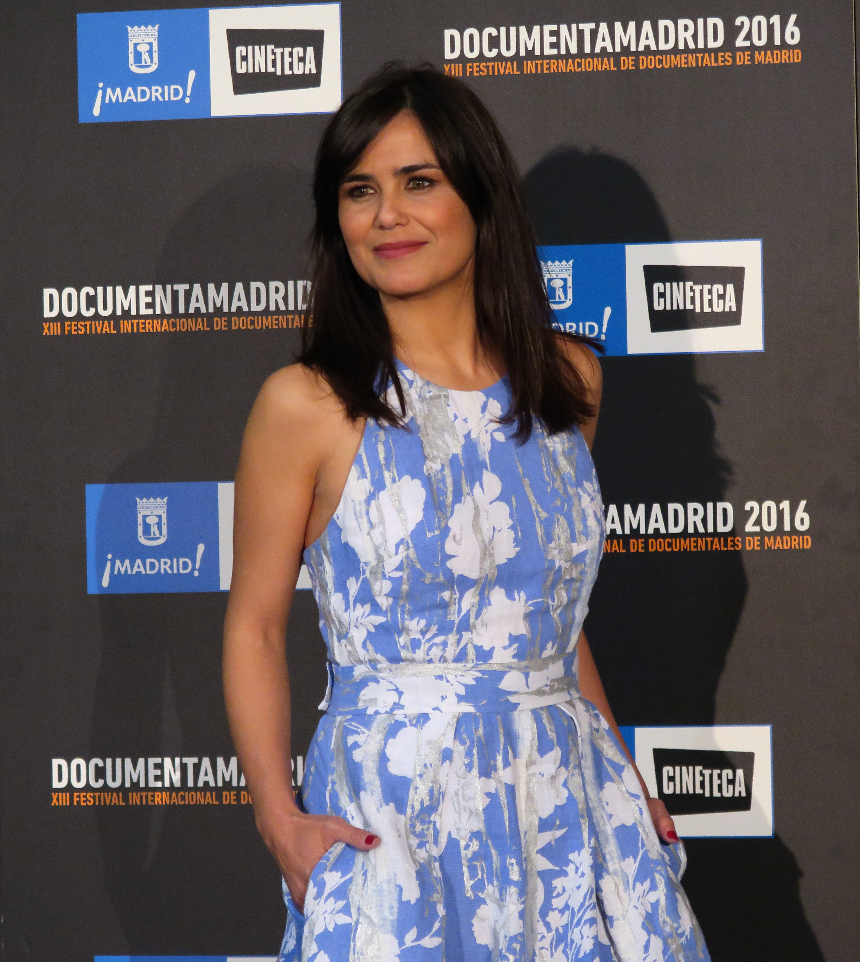 Elena Sánchez Sánchez, en DocumentaMadrid 2016